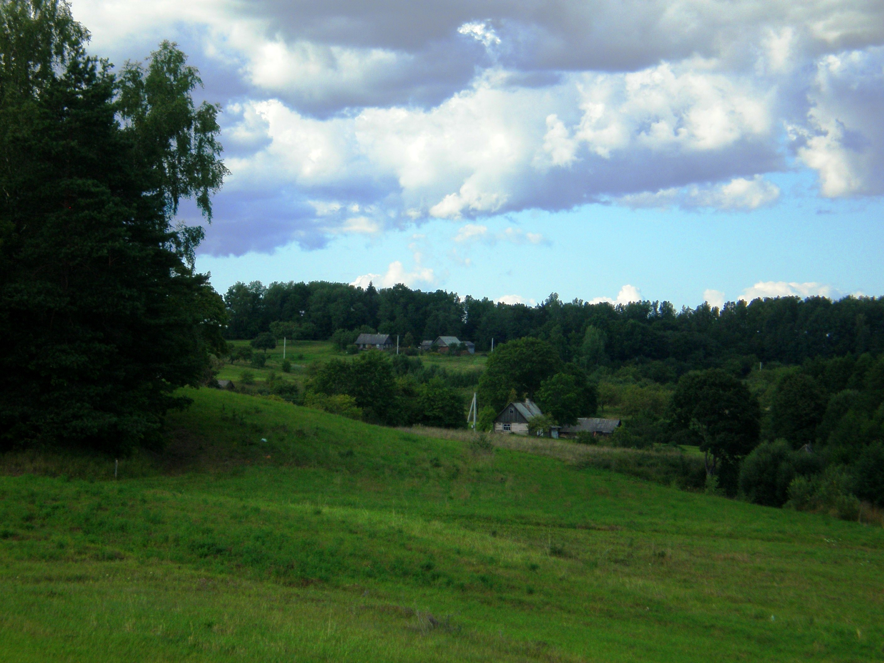 Veselava, Zarasų raj., Lietuva